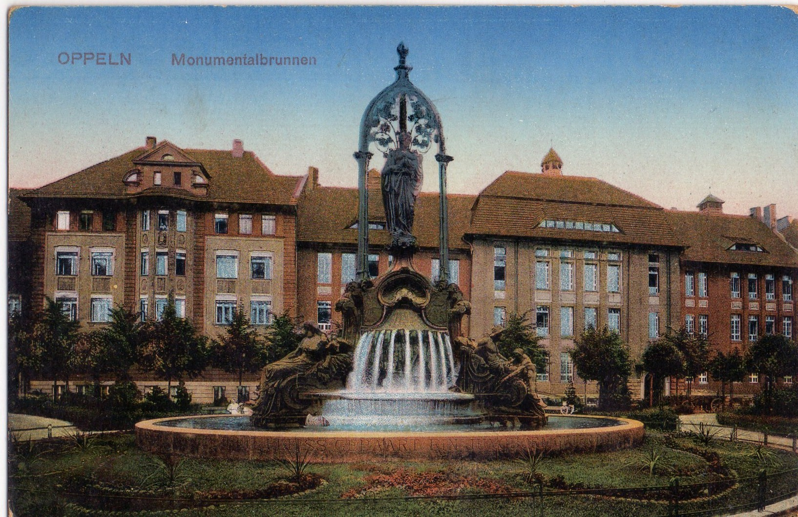 Alte Ansichtskarte von Oppeln/Opole - 1917